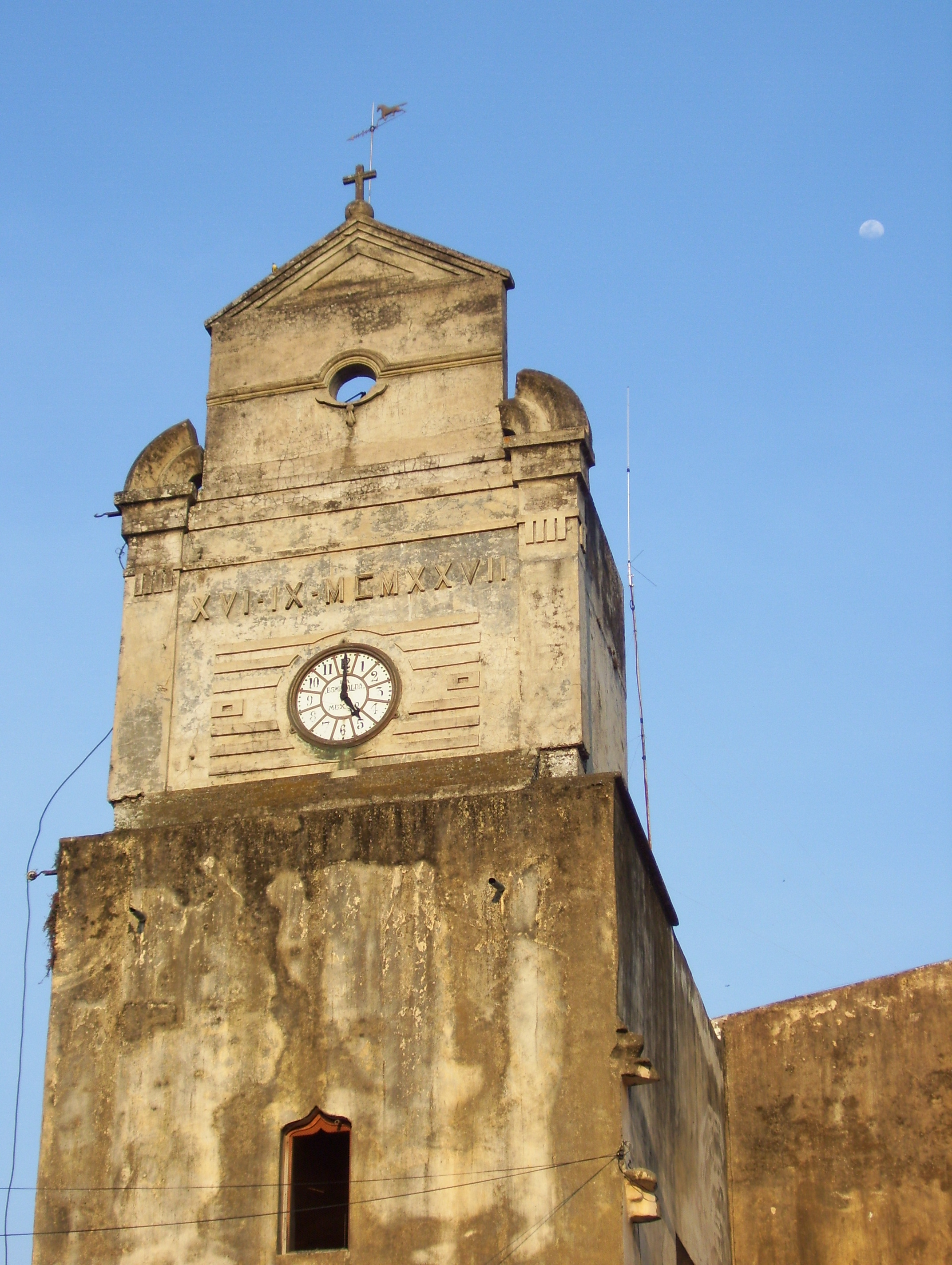 Templo de San Agustín, el edificio más antiguo de San Luis Potosí, construido entre 1550 y 1557; el reloj en esta torre es una adición posterior (1927)